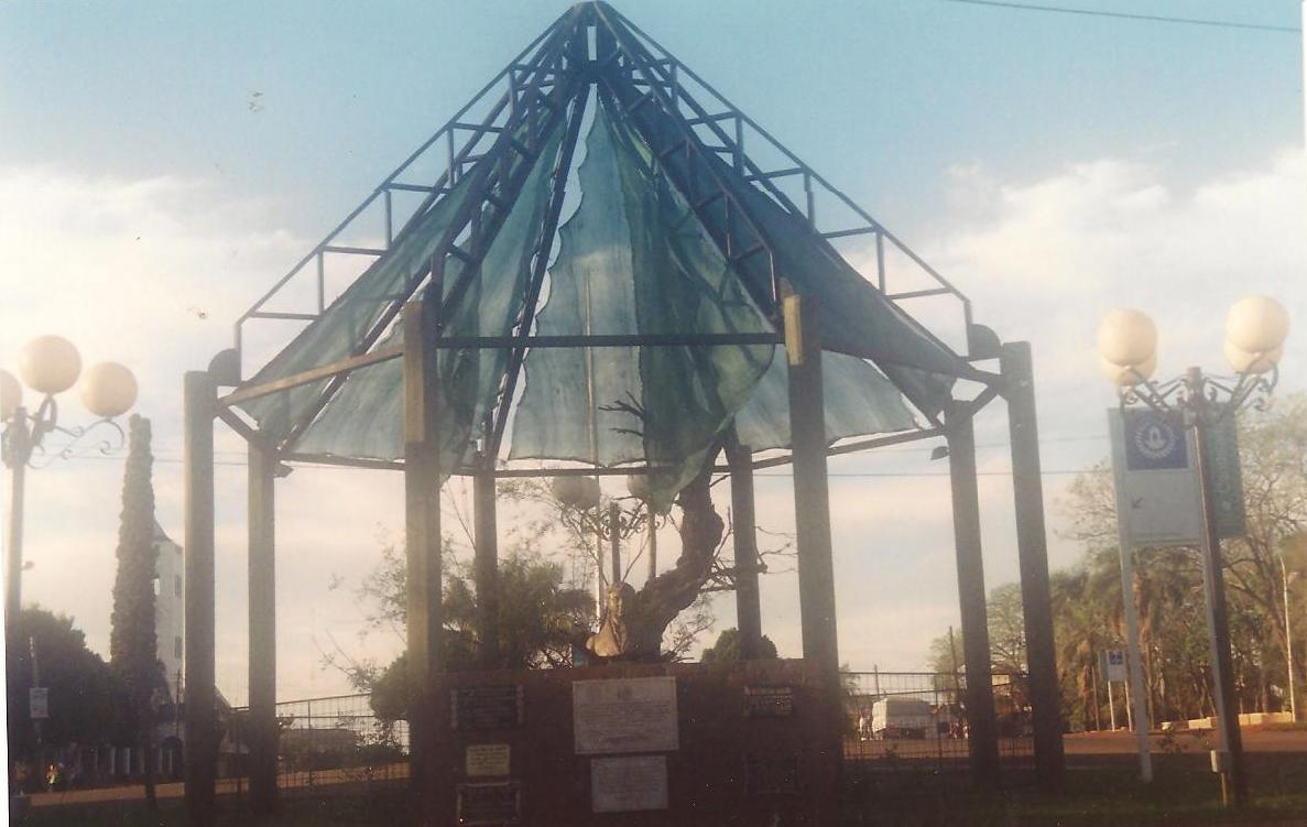 Lugar histórico en la localidad de Candelaria Pcia. de Misiones, Argentina, donde en 1811 el Gral Manuel Belgrano, descansó a su sombra antes del cruce con sus tropas el Río Paraná hacia la isla de Mandisoiví Paraguay